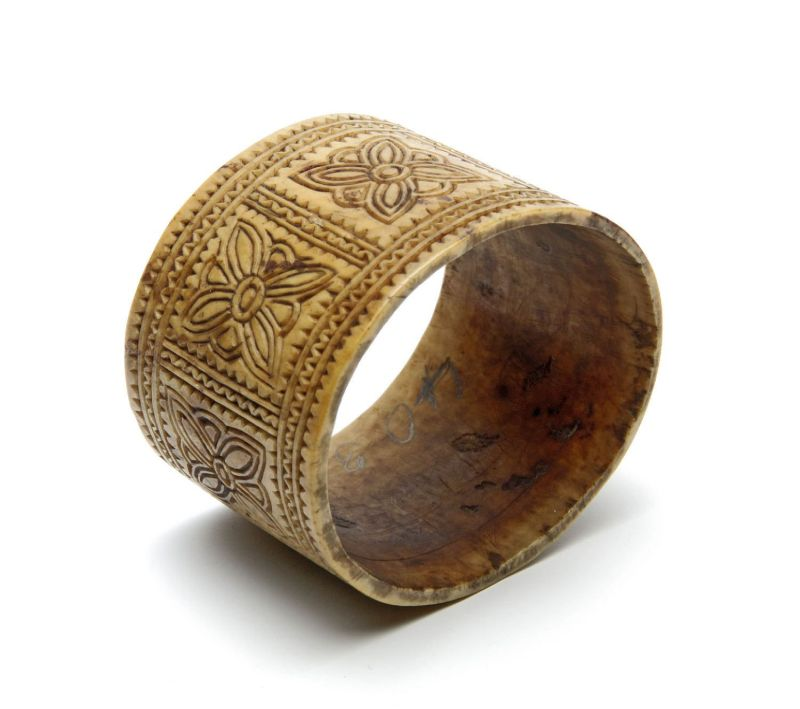 Armsieraad. Ivoren armband met bruin ingekleurde ingesneden bloemversieringen